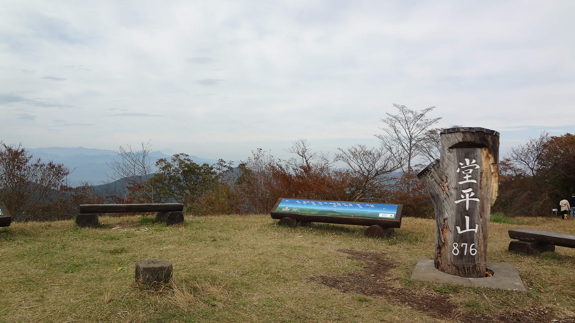 堂平山 山頂（標高876m） 2013年11月3日撮影